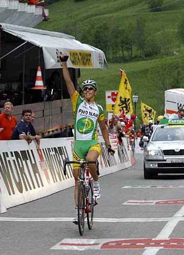 Site steve morabito administré par moi meme